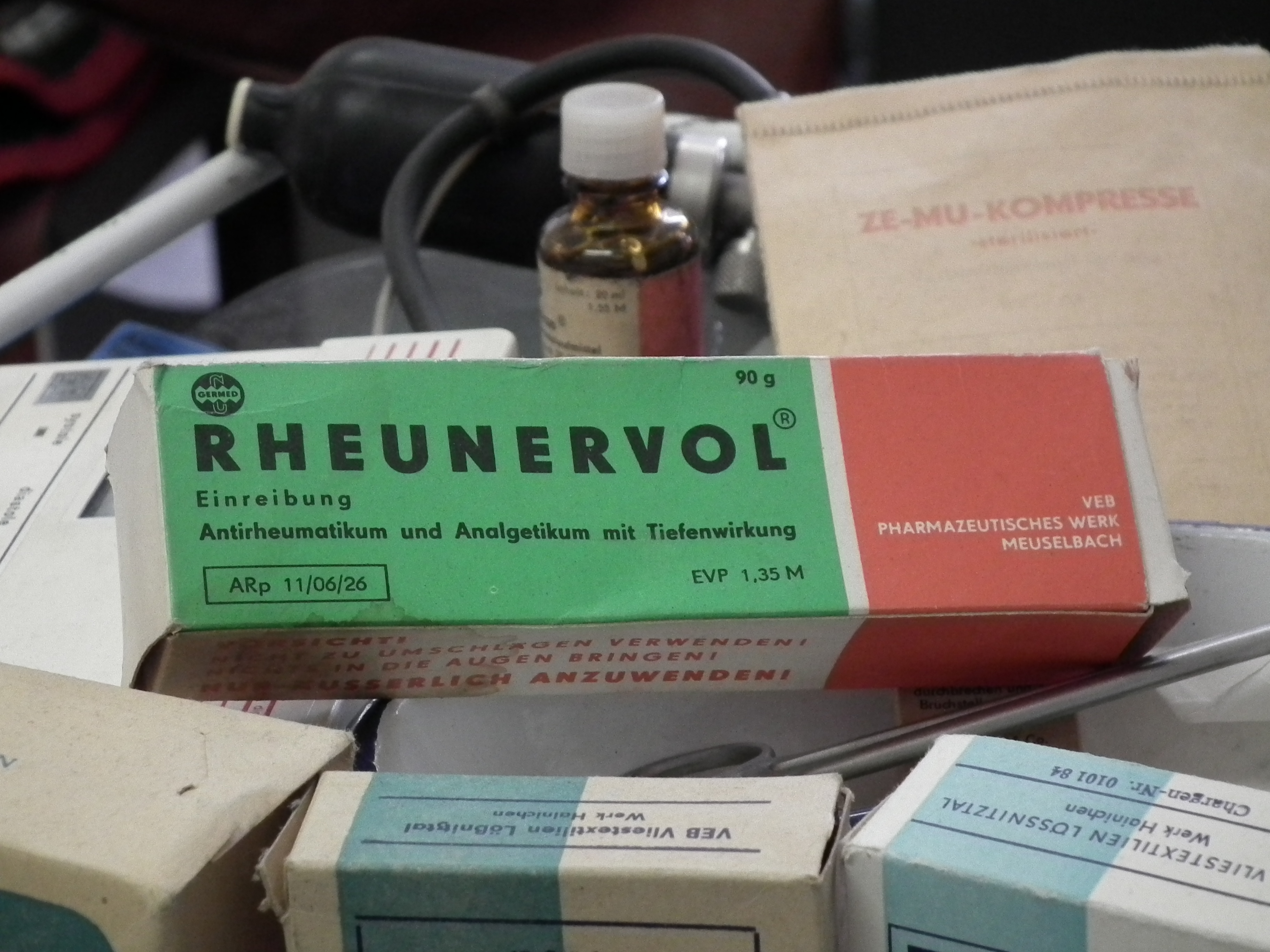 DDR Museum Zeitreise Radebeul, Rheunervol von VEB Pharmazeutisch-Chemische Fabrik Meuselbach, Fotografiert mit Genehmigung der Museumsleitung